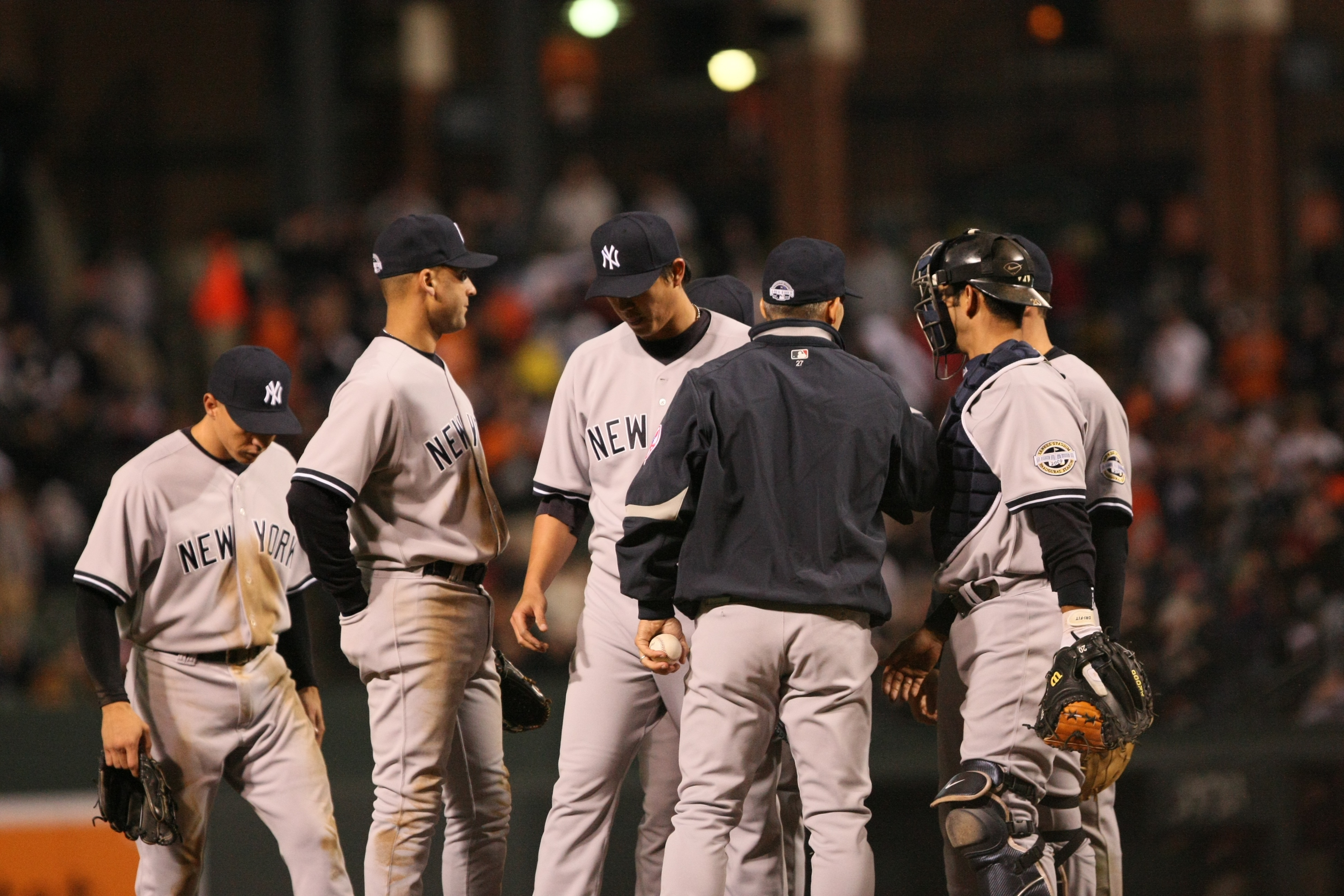 Chien-Ming Wang